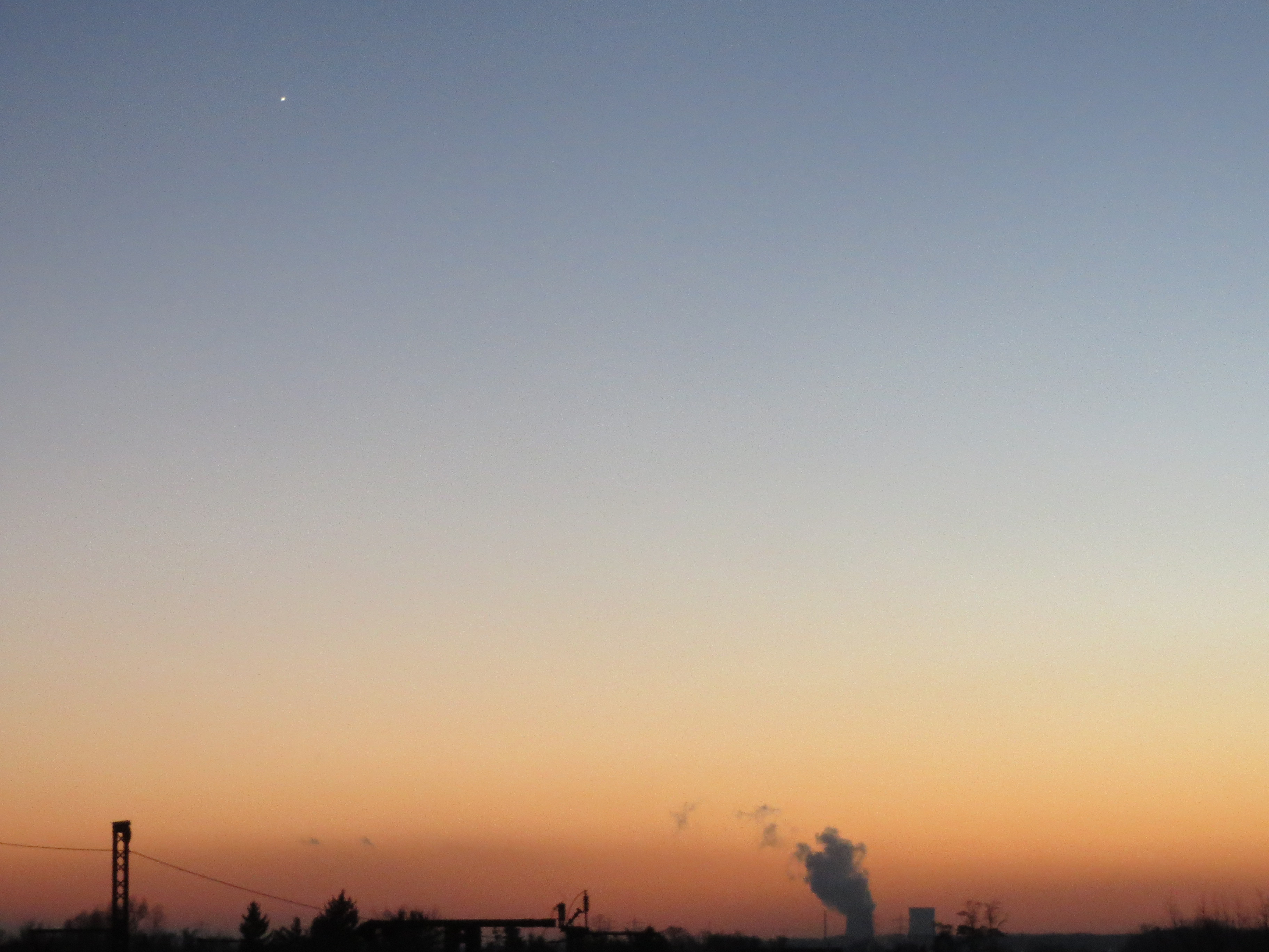 Abendhimmel über Hockenheim